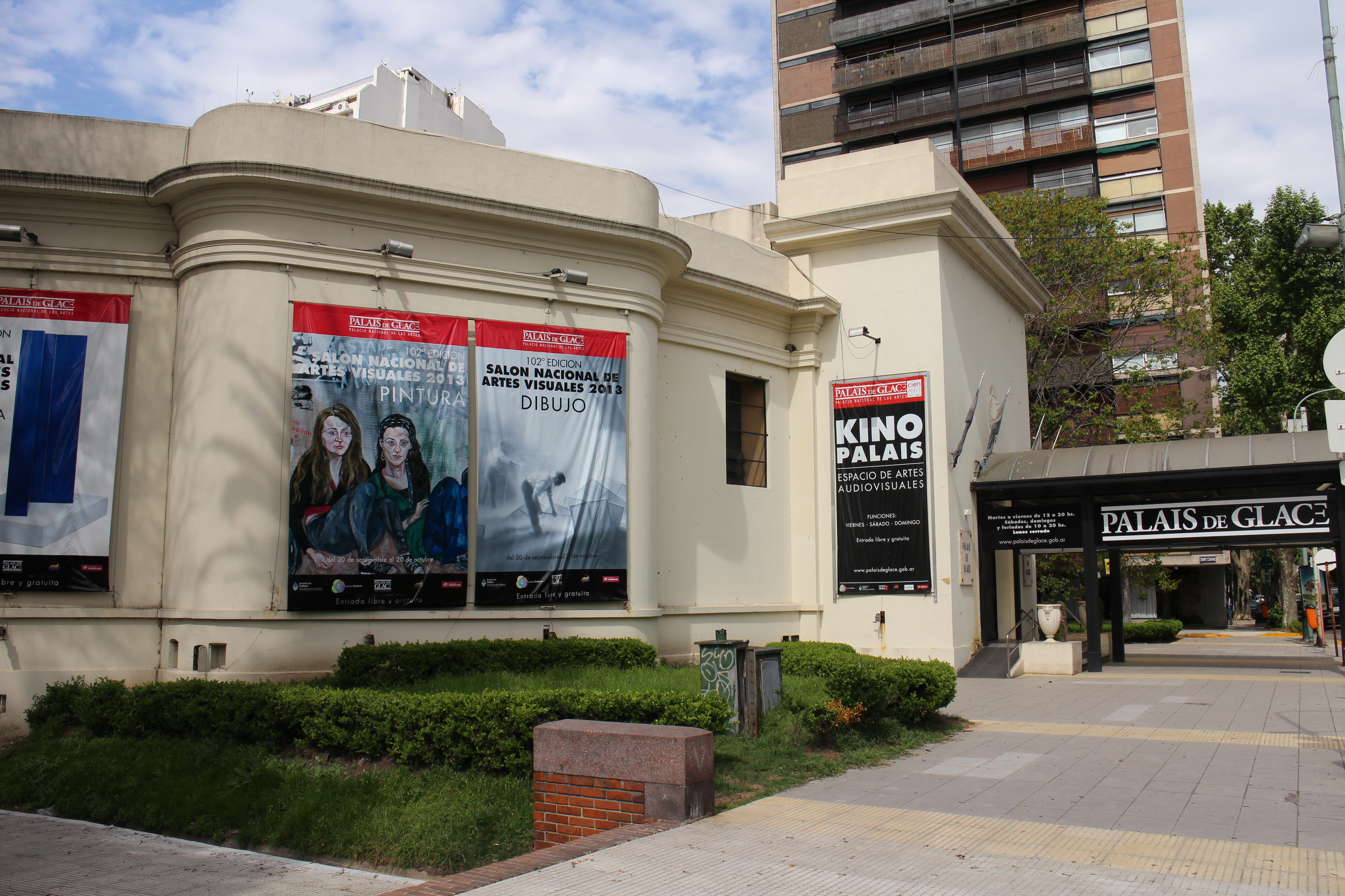 Palais de Glace, Recoleta, Ciudad Autónoma de Buenos Aires.